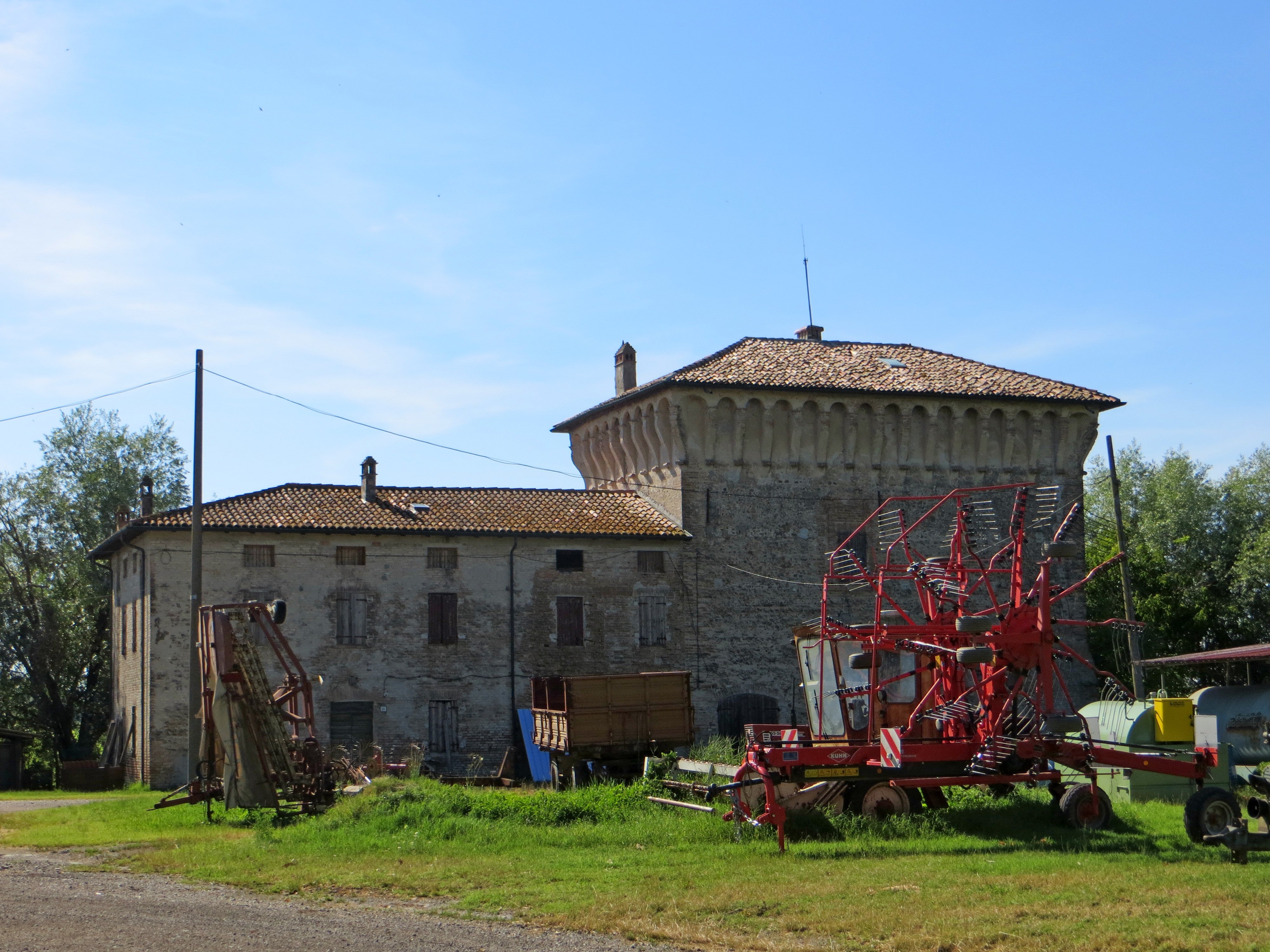 Torrione (Vicomero, Parma) - lato est